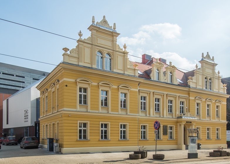 Bydgoszcz, ul. Gdańska 4 - dawny klasztor klarysek, obecnie muzeum, XVI-XIX w.